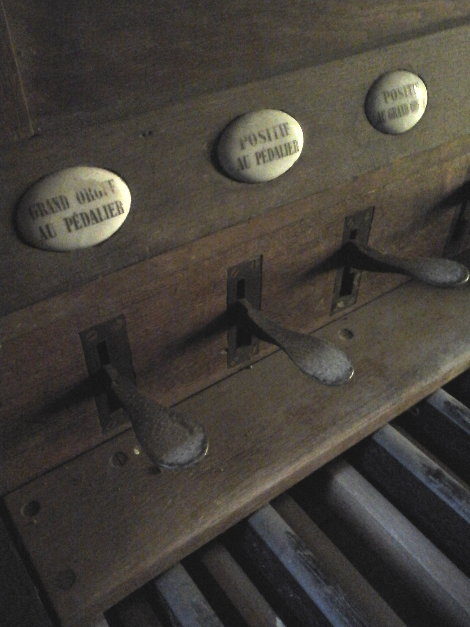 Quelques pédales de combinaisons, ajoutés en 1923 lors de la reconstruction de l'instrument par Pol Renault.